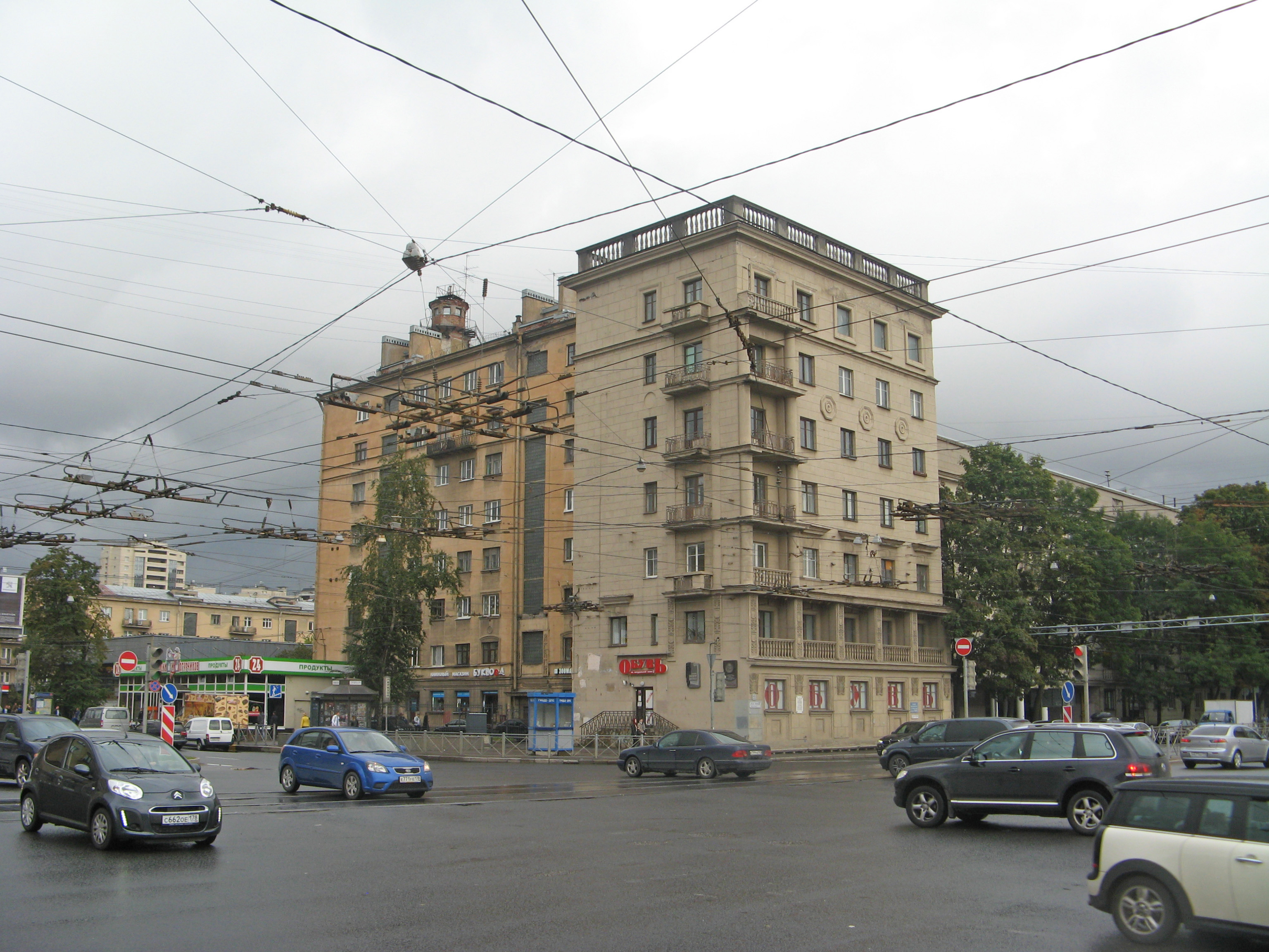 Дом, в котором жили Бонч-Бруевич и Хлопин В. Г.: проспект Лесной, 61, Выборгский район, Санкт-Петербург